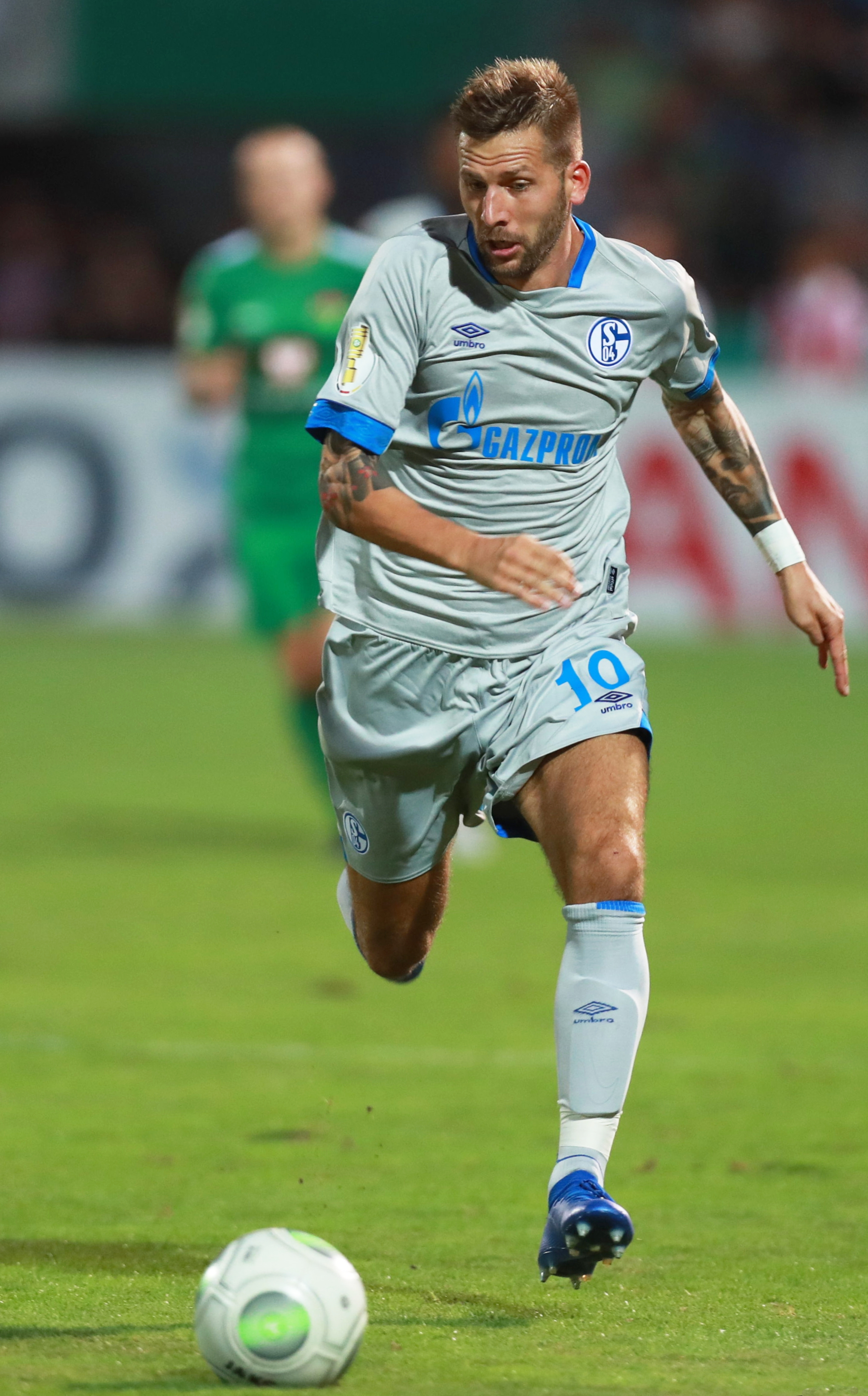 DFB-Pokal 2018/19, 1. Hauptrunde: 1. FC Schweinfurt 05 gegen FC Schalke 04 0:2 (0:1)